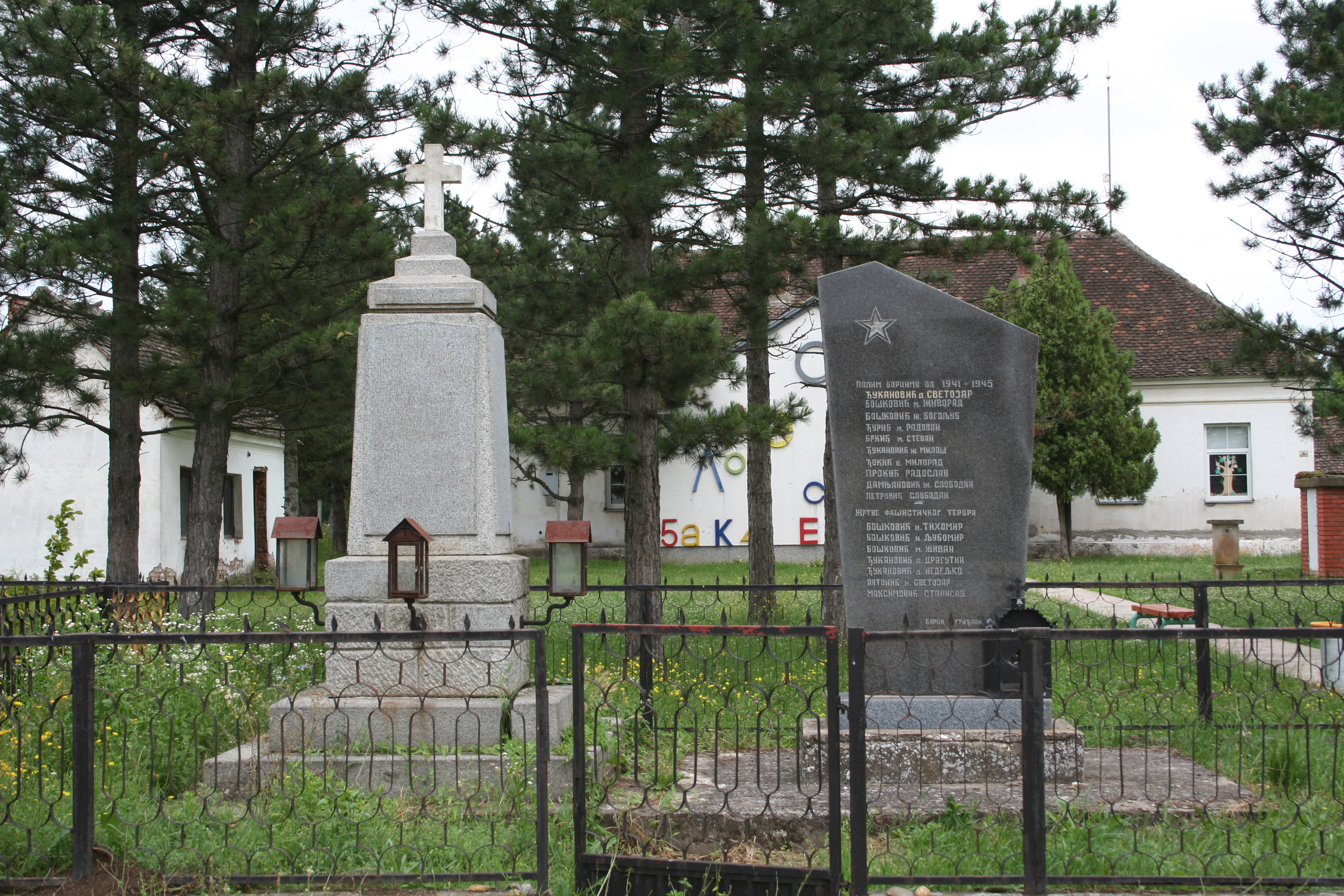 Spomenici u centru sela, Mala Vranjska